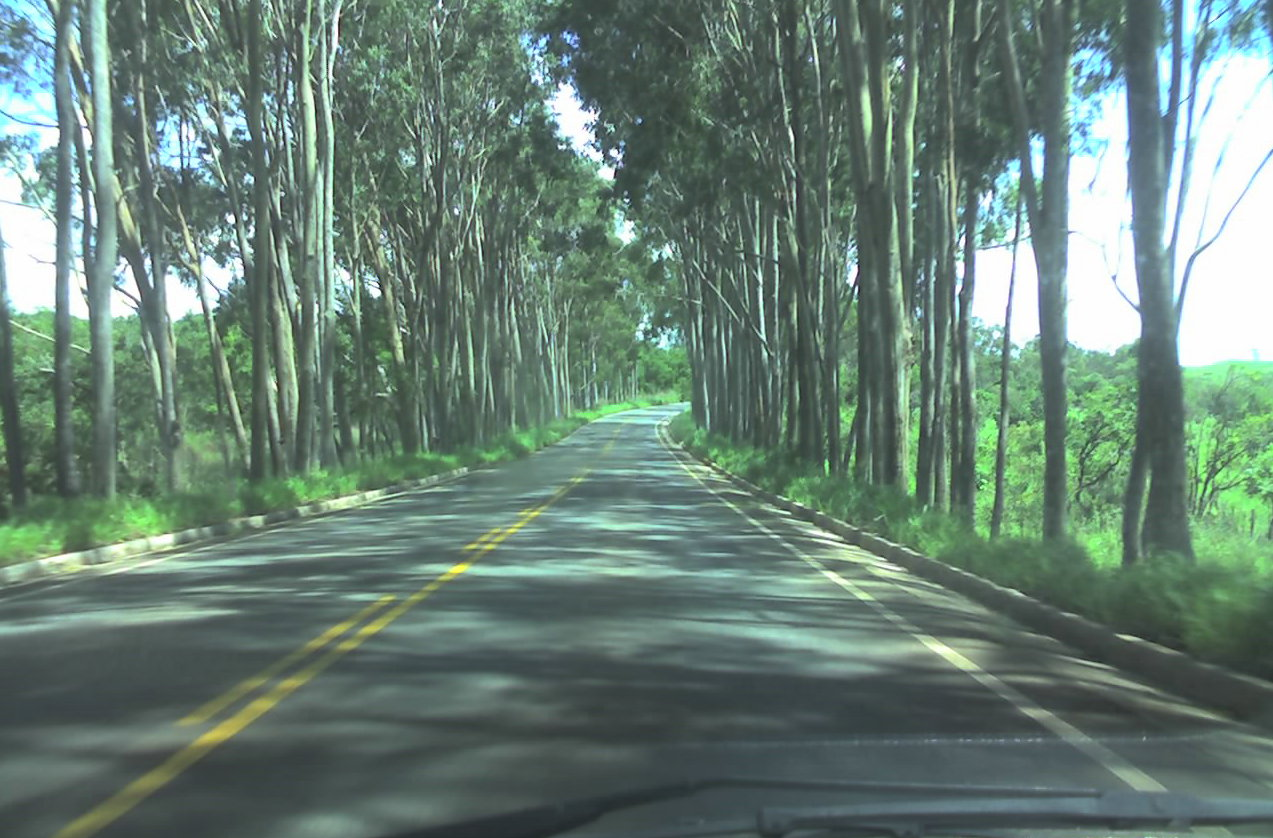 Estrada Vazante / Lagamar - MG